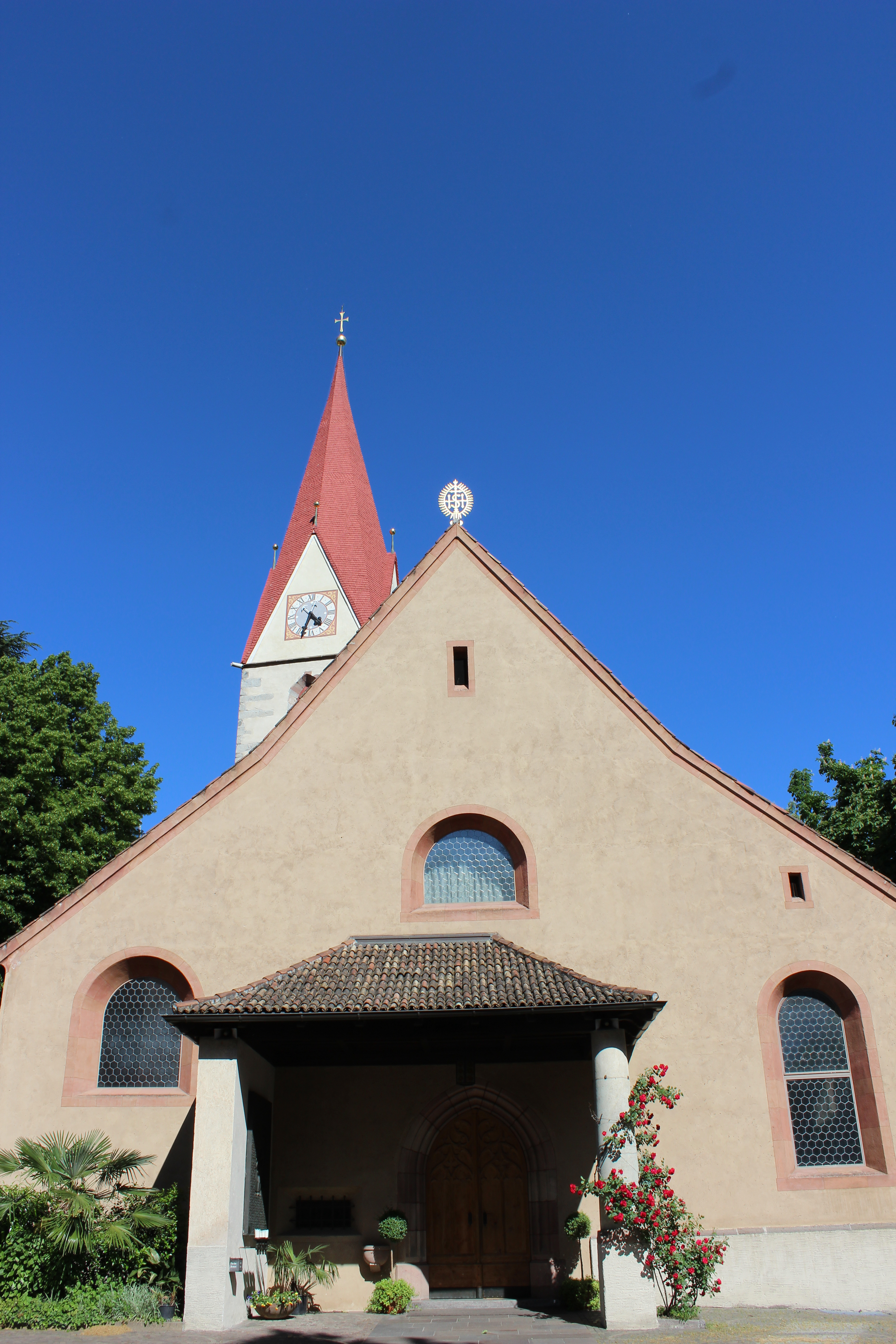 Pfarrkirche St. Georg in Obermais